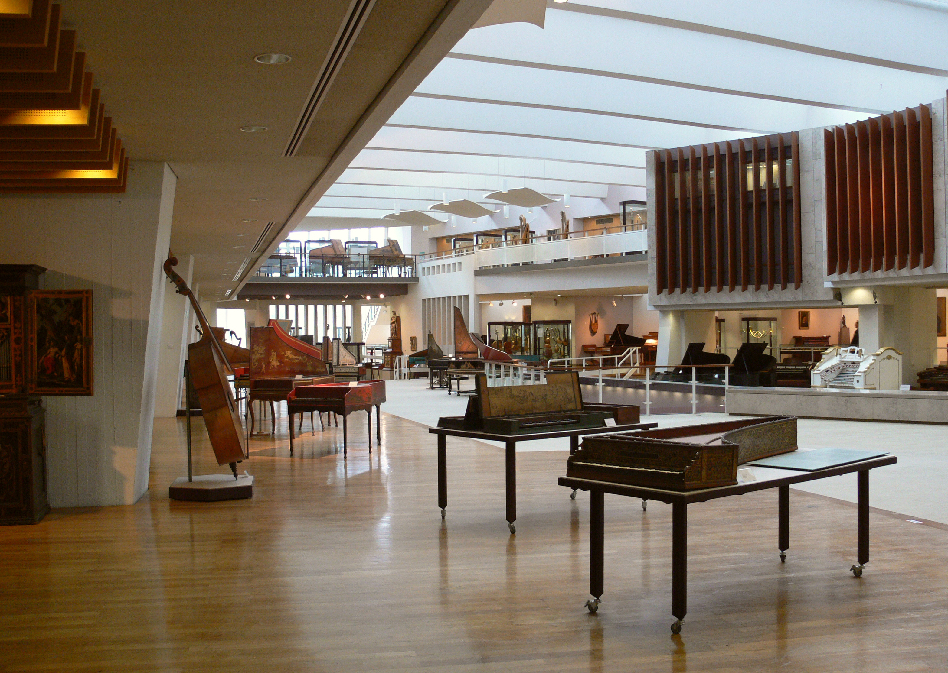 Musikinstrumenten-Museum Berlin